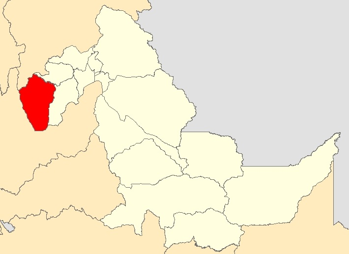 Mapa distrito Padre Abad,Ucayali - Perú